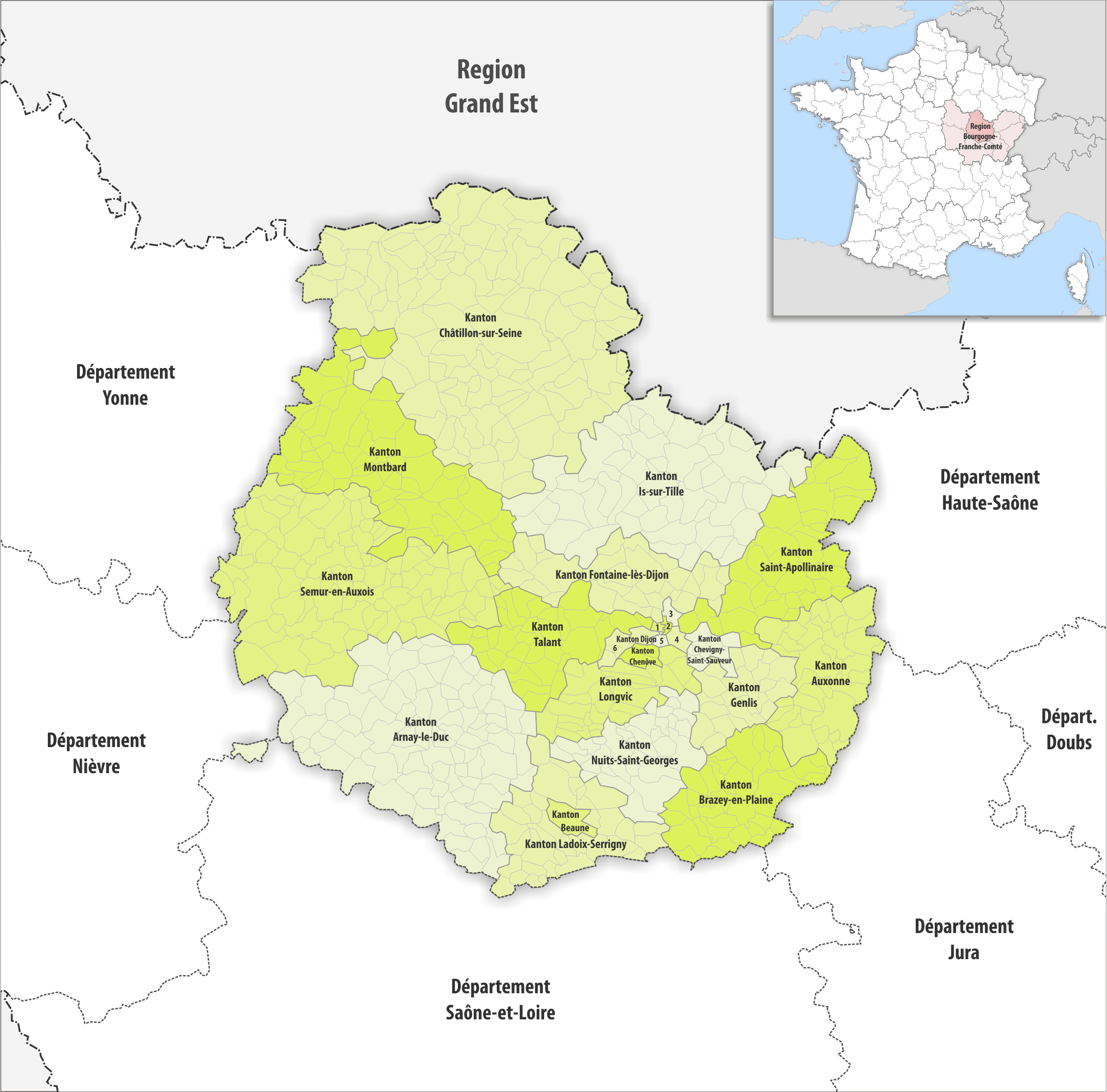 Gemeinden und Kantone im Departement Côte-d’Or